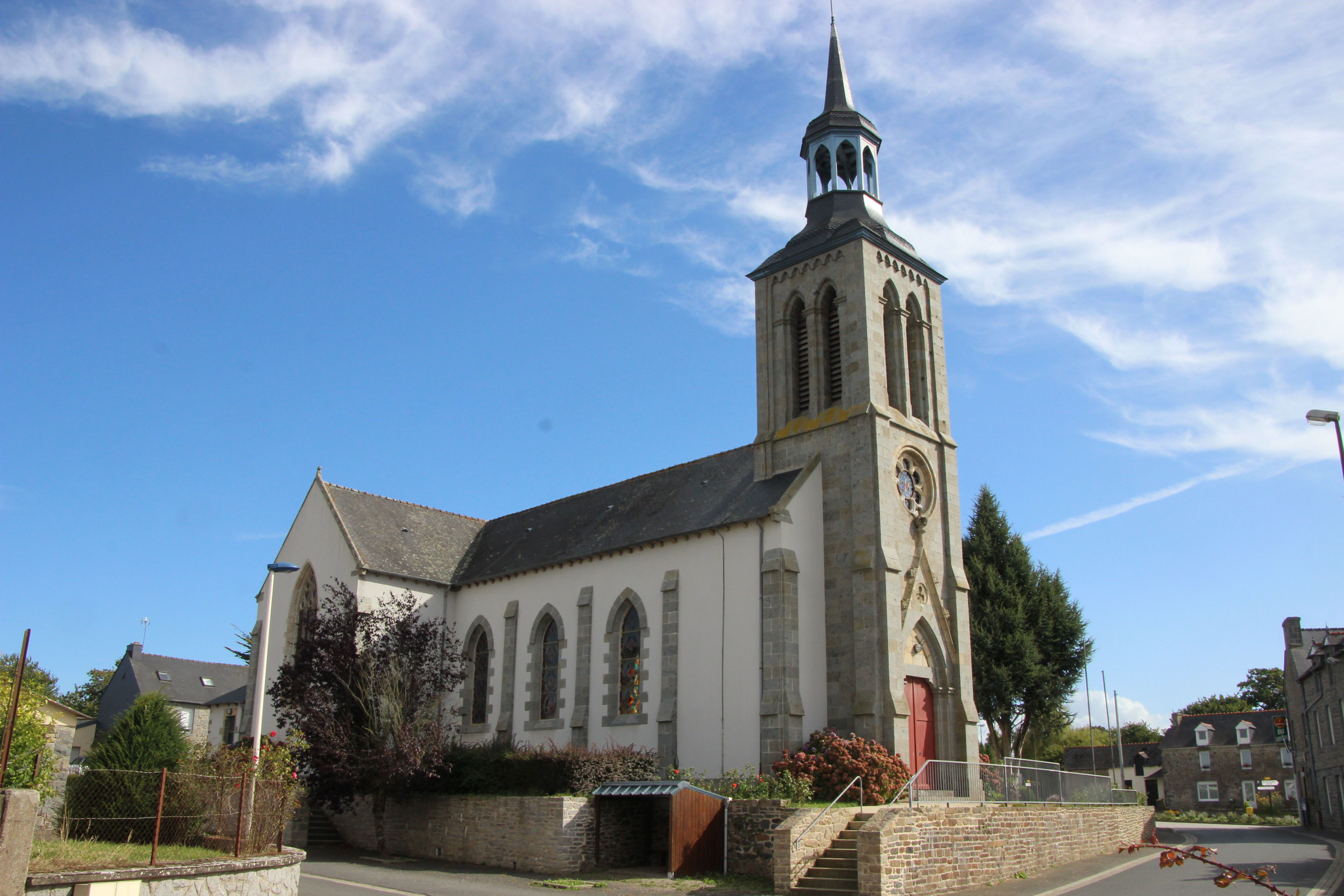 église st pierre